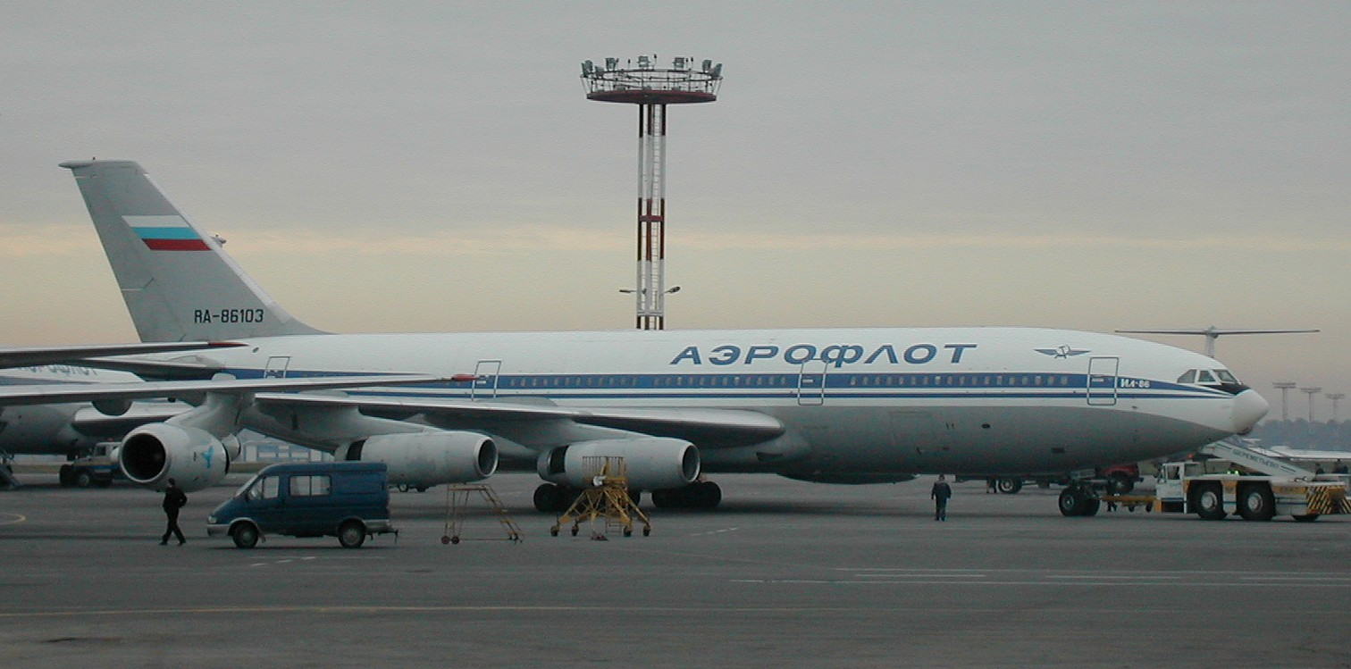 Samolot Iliuszyn Ił-86 w barwach rosyjskich linii lotnich Aerofłot - Moskwa, Szeremietiewo-1, sierpień 2002 r.